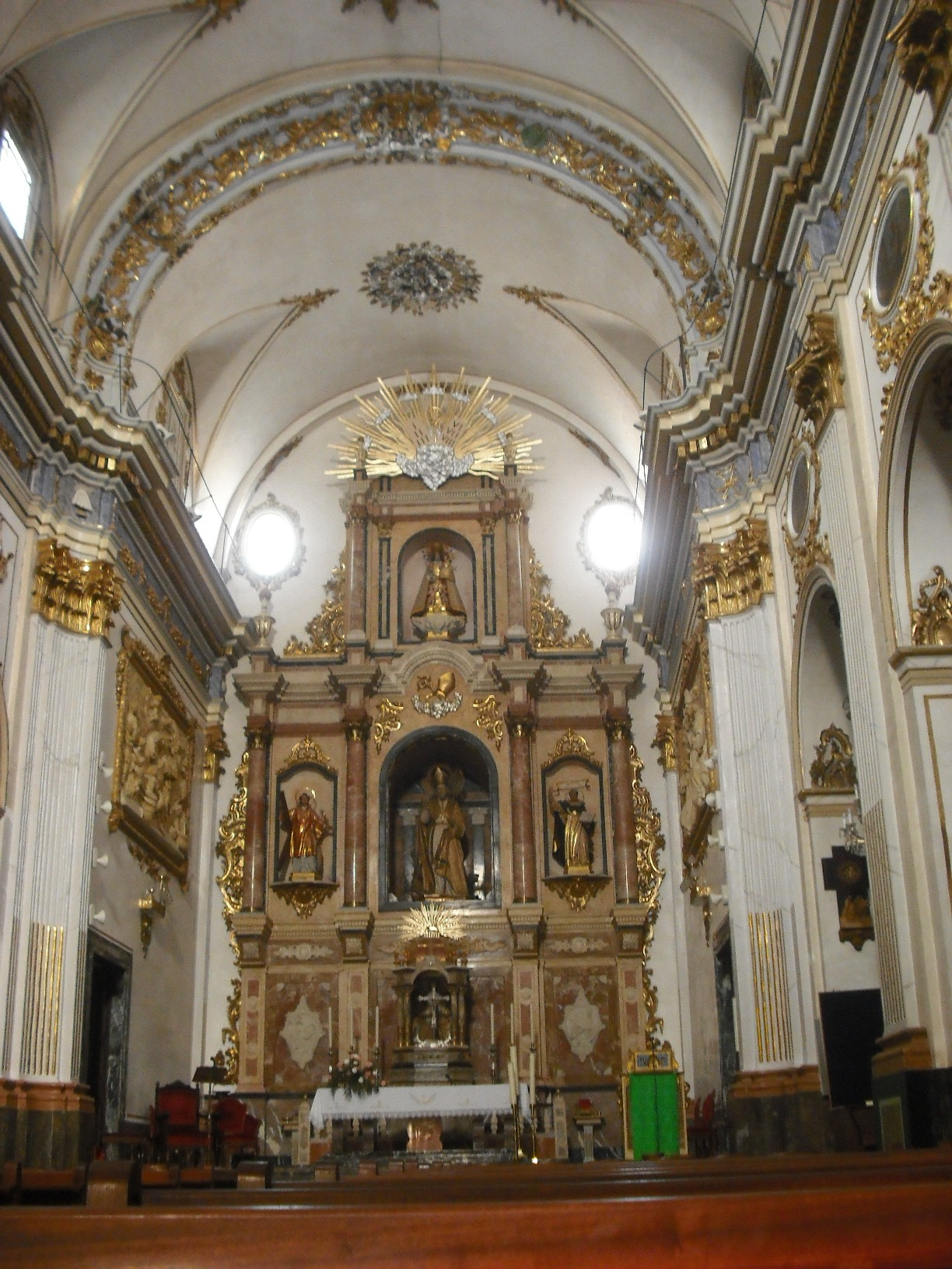 Interior de l'església de Sant Honorat.